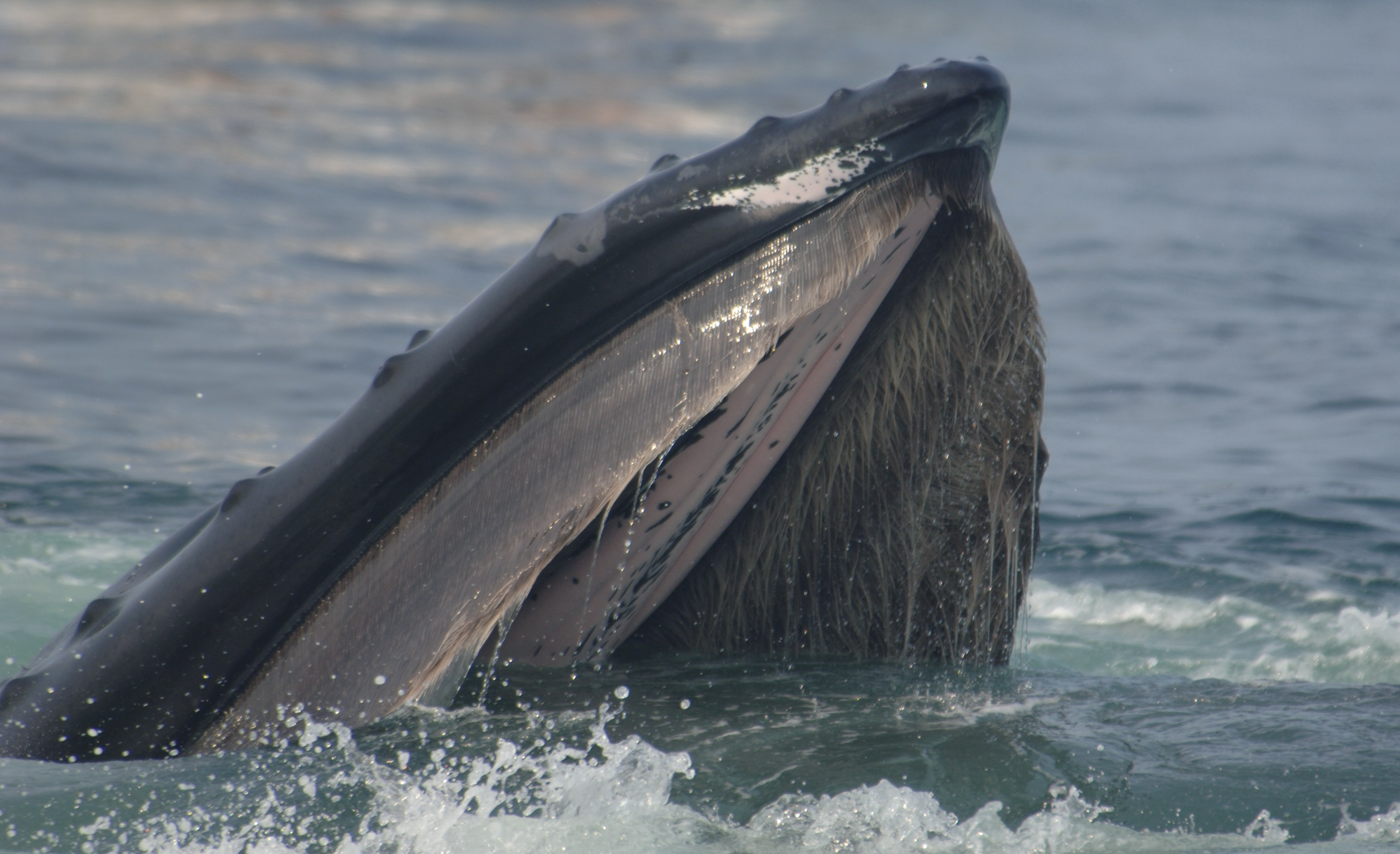 anim1090